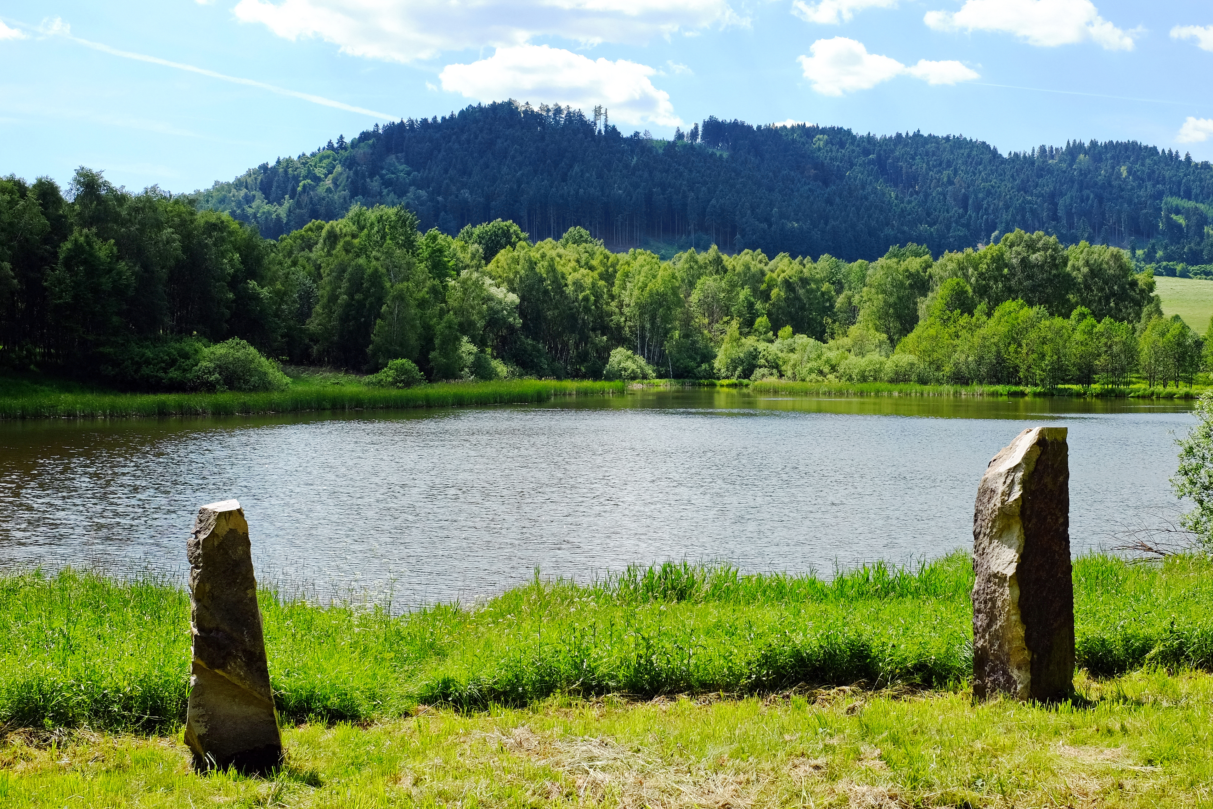 Branišovský vrch v Tepelské vrchovině, okres Karlovy Vary